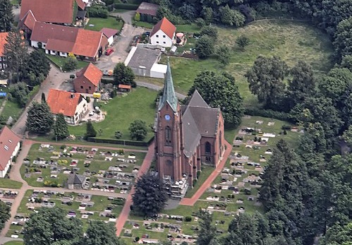 Bilder vom Flug Nordholz-Hammelburg 2015: Ev.-luth. St. Agnes-Kirche in Steinbergen